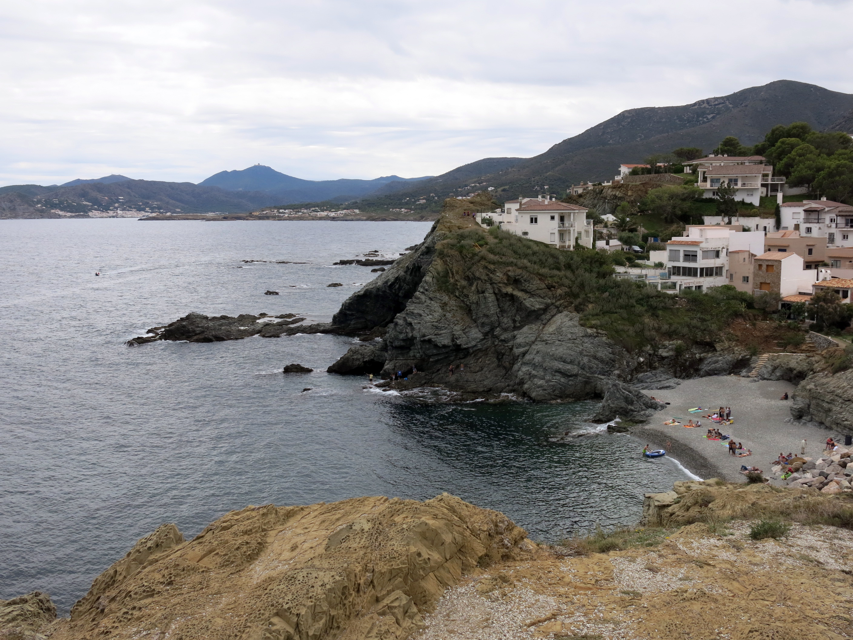 Platja de la Gola (Llançà) This is a a photo of a beach in Catalonia, Spain, with id: PL-CT-17003-354